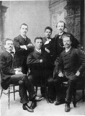 Utilistiska samfundet. Styrelsen 1890